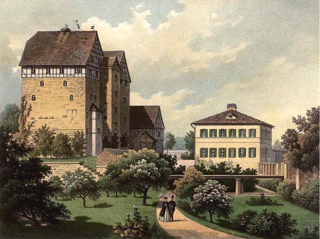 Schloss Seebach, Kreis Langensalza, Provinz Sachsen